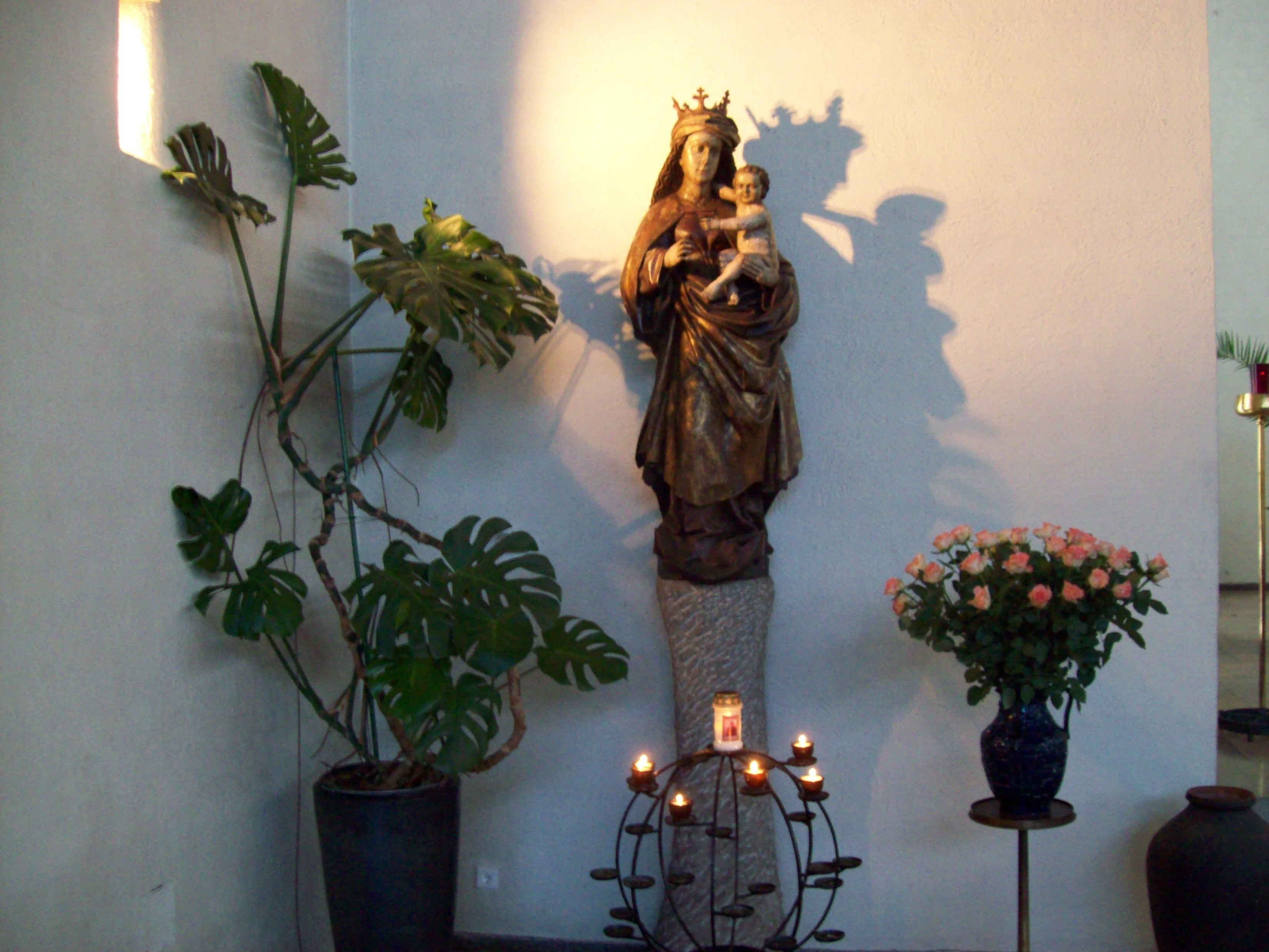 St. Peter und Paul Obernau - Madonno um 1490